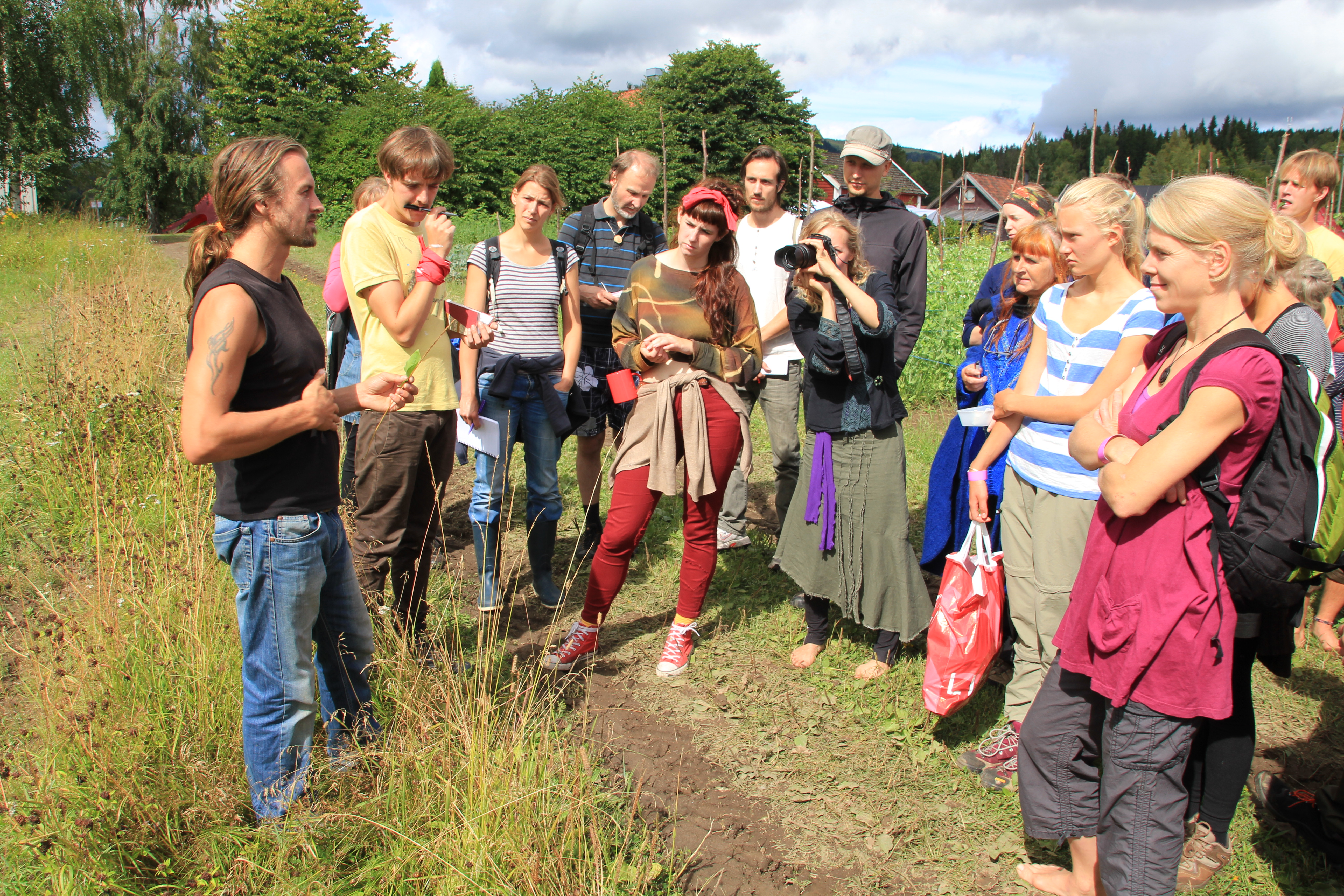 Fra Hurdal økolandsby og den skandinaviske permakulturfestivalen i 2013.